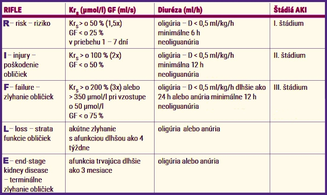 Štádia akútneho poškodenia obličiek podľa kritérii RIFLE (Krs - kreatinín v sére, GF- glomerulárna filtrácia, D - diuréza)